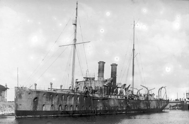 Das ehemalige deutsche Kanonenboot " Panther ", berühmt durch den "Panthersprung" nach Agadir/Marokko, wird in Kiel versteigert! Das Kanonenboot "Panther" auf dem Schiffs-Friedhof in Kiel, wo es versteigert wird.